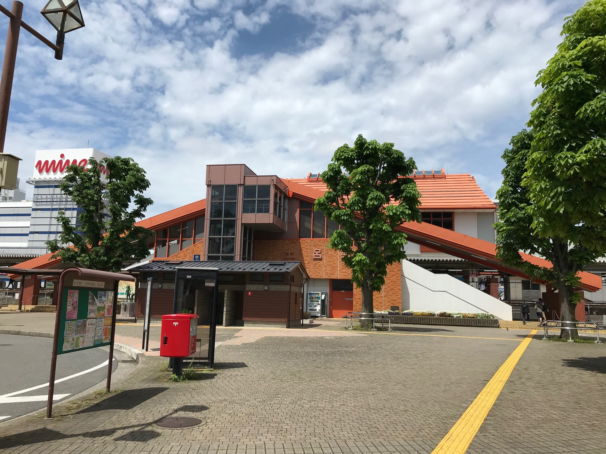 土呂駅東口において、2019年5月1日に撮影しました。